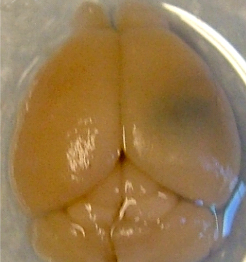 Gehirn einer Maus. Die blaue Farbe (Trypanblau) zeigt die lokale Öffnung der Blut-Hirn-Schranke an.